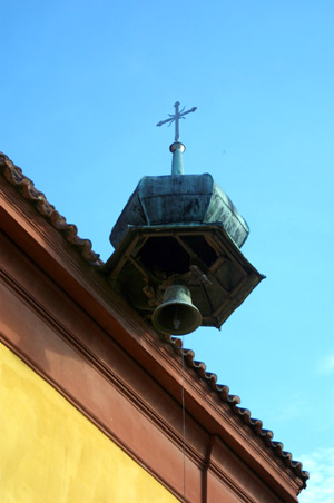 Barokní kaple Jména Panny Marie v Mladoticích postavená podle projektu Jana Blažeje Santini-Aichela. Pohled na baldachýn se zvonem.